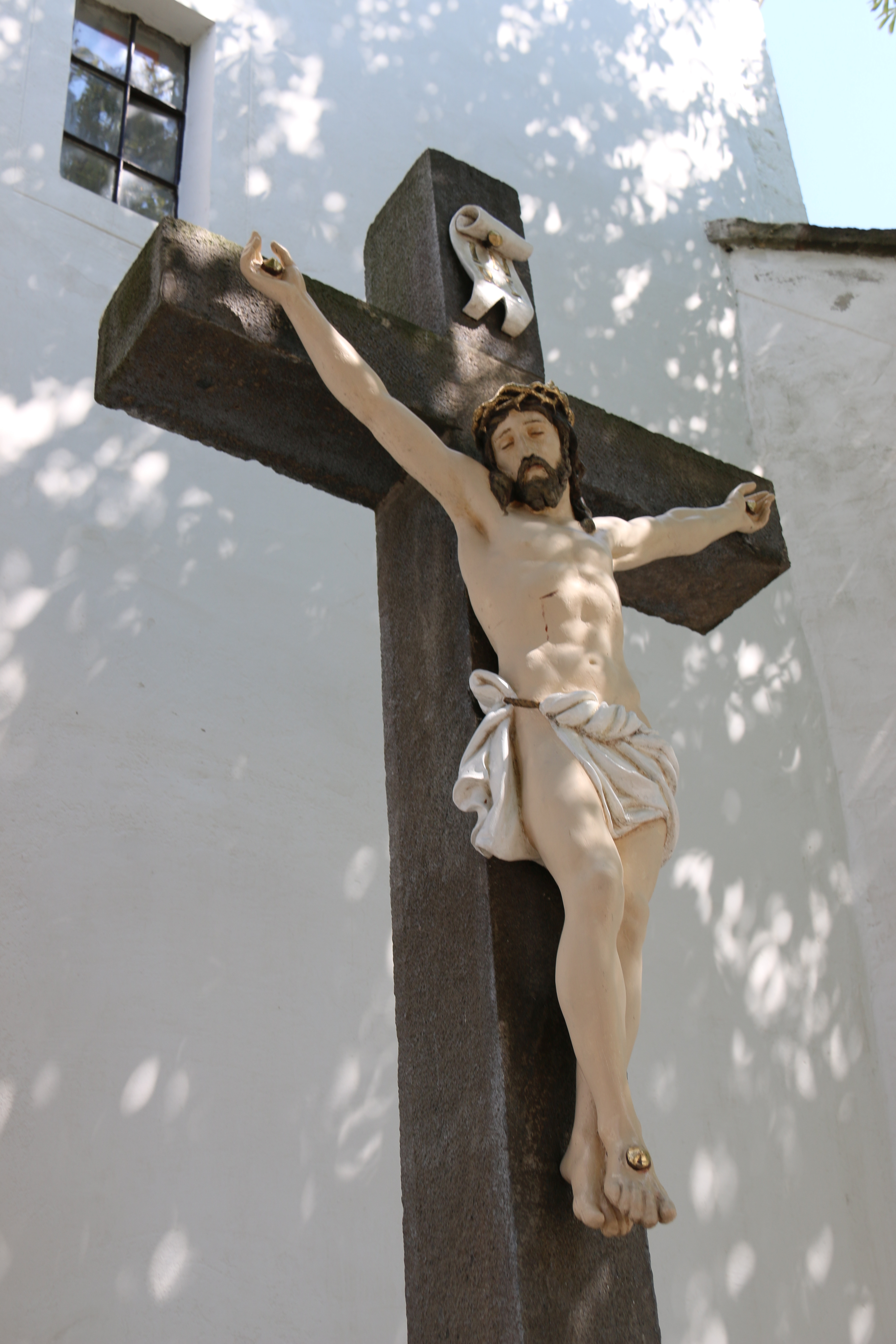 A Keresztelő Szent János-plébániatemplom melletti, Jézus Krisztust, az emberiség megváltóját, a megdicsőülés reményét ábrázoló feszület